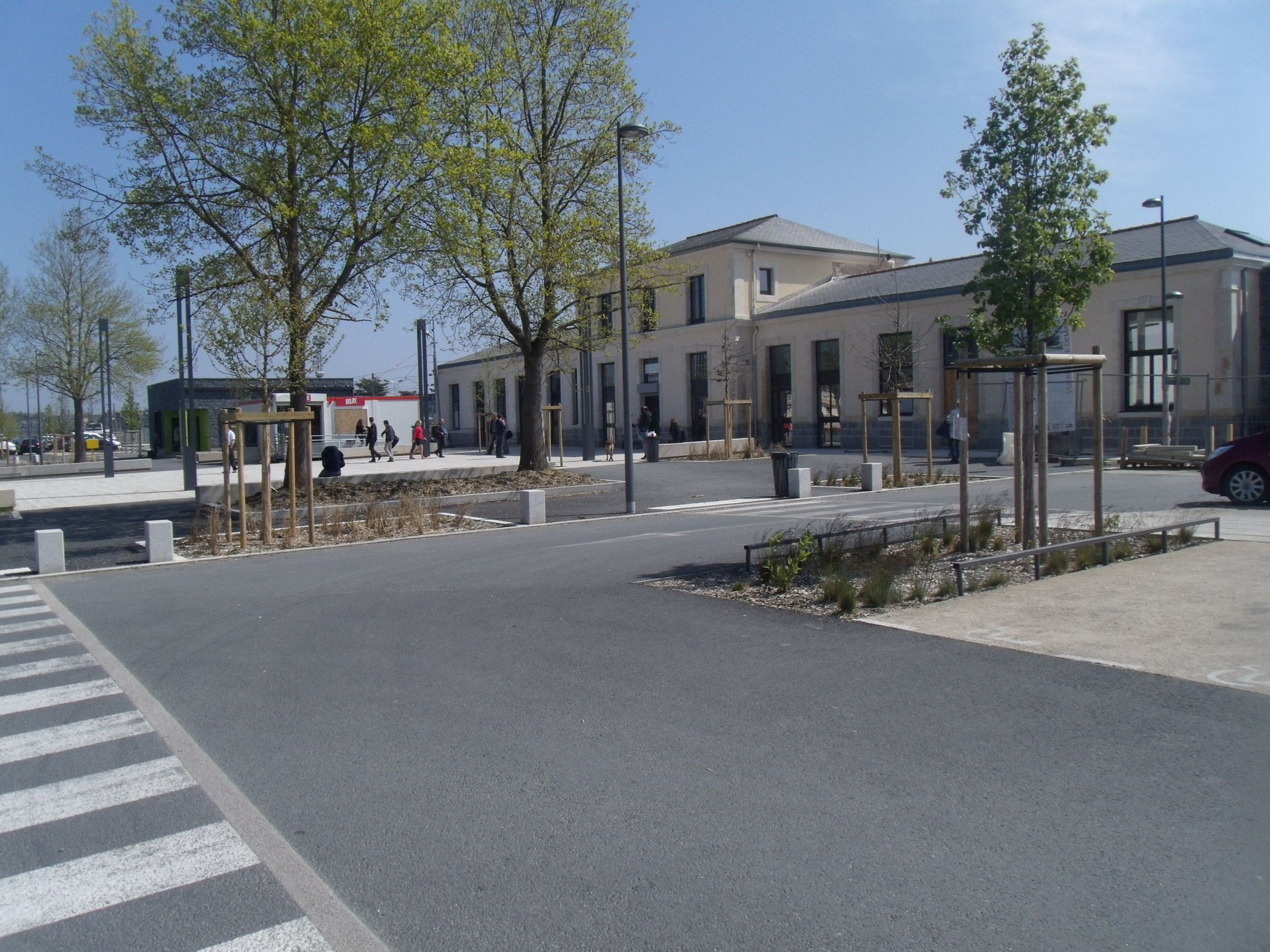 Le bâtiment voyageurs de la gare de Guingamp en avril 2015